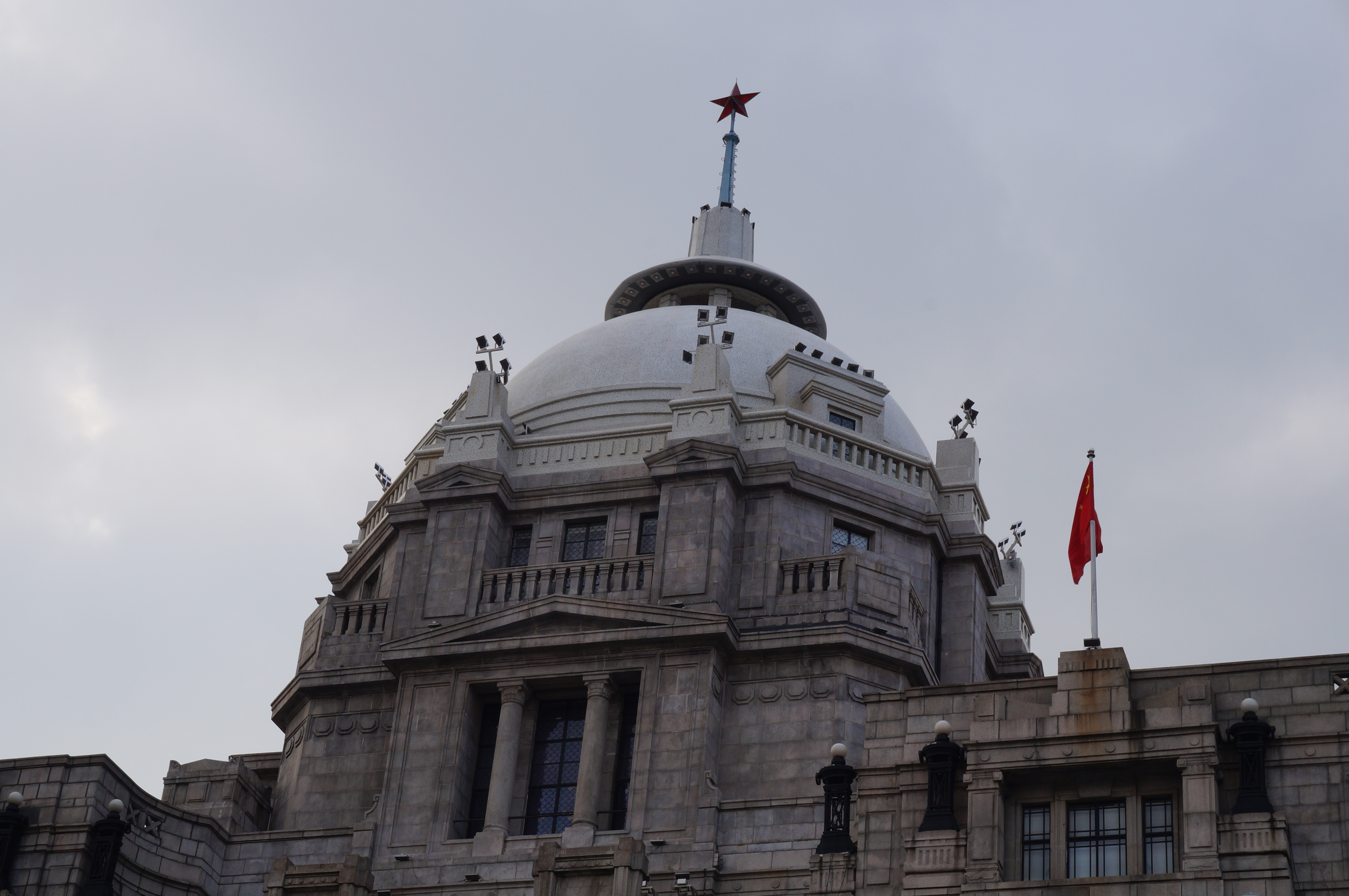 外滩汇丰银行大楼的穹顶